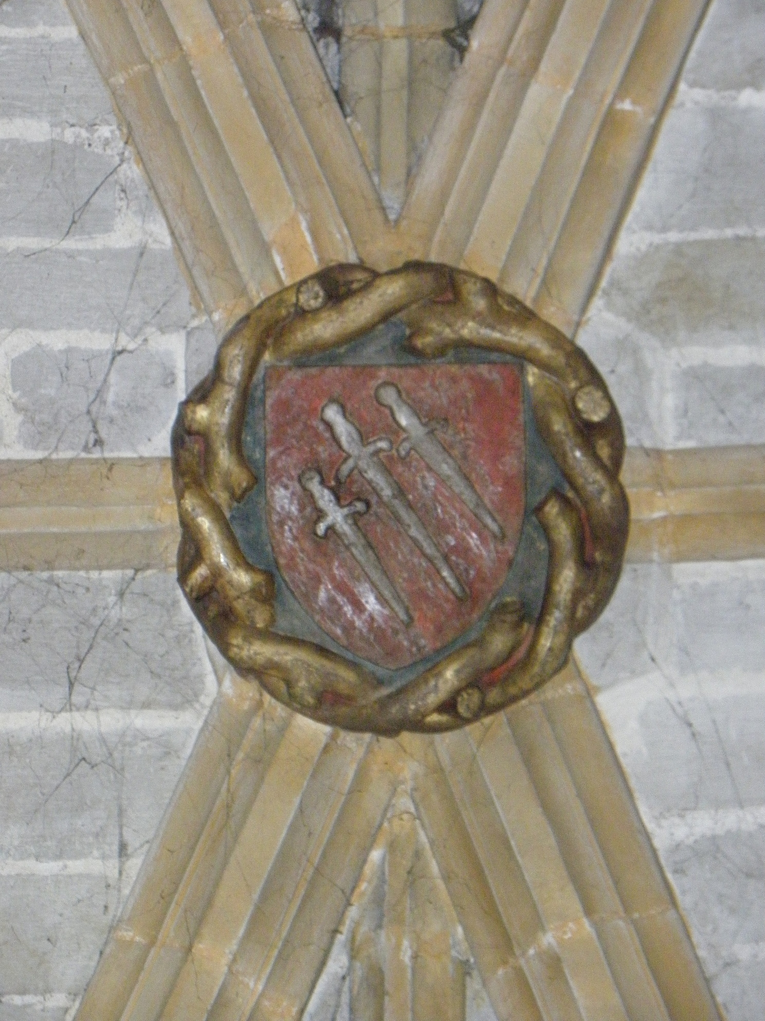 Armes de Pierre Landais. Clef de voûte de la quatrième chapelle nord de l'église Notre-Dame de vitré (35).